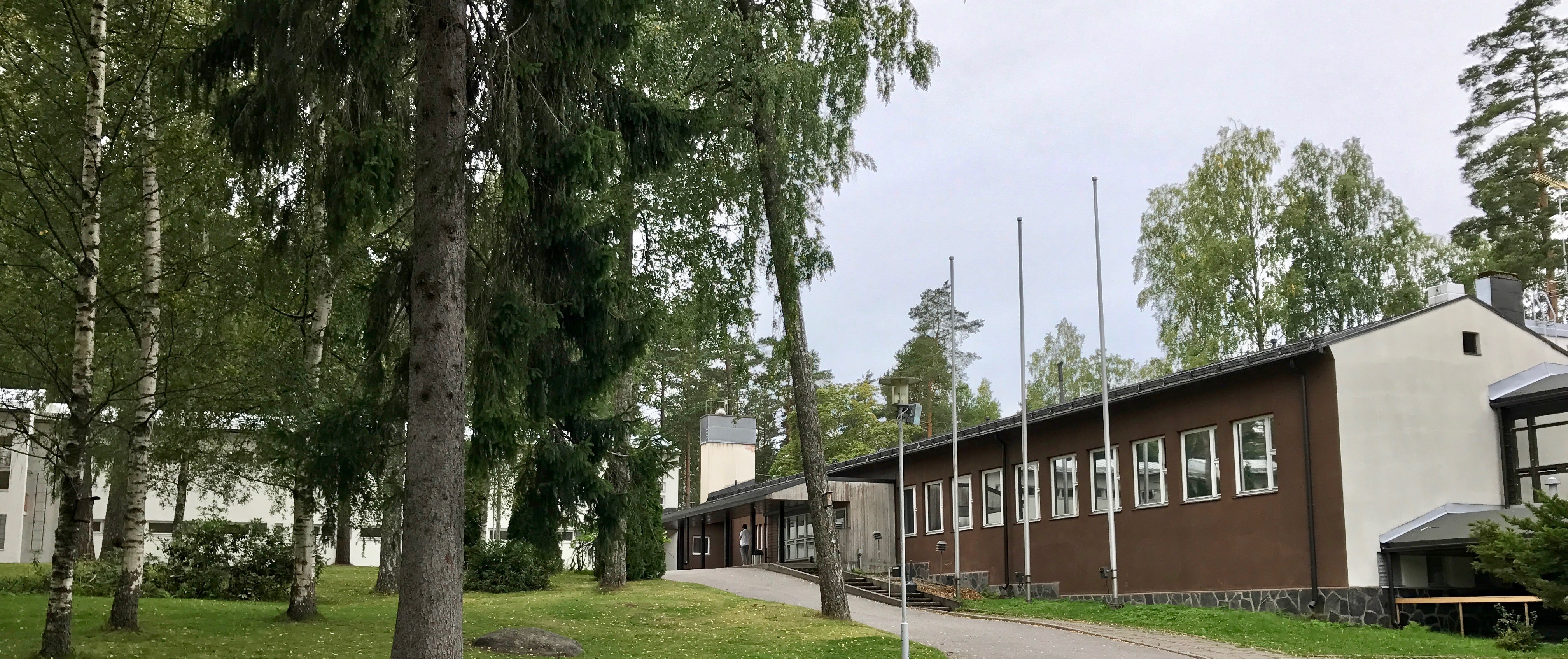 Siikajärven vastaanottokeskus Espoon Siikajärvellä.